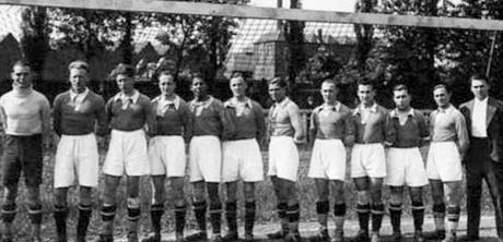 Equipe du SC Fives lors de la saison 1933-1934